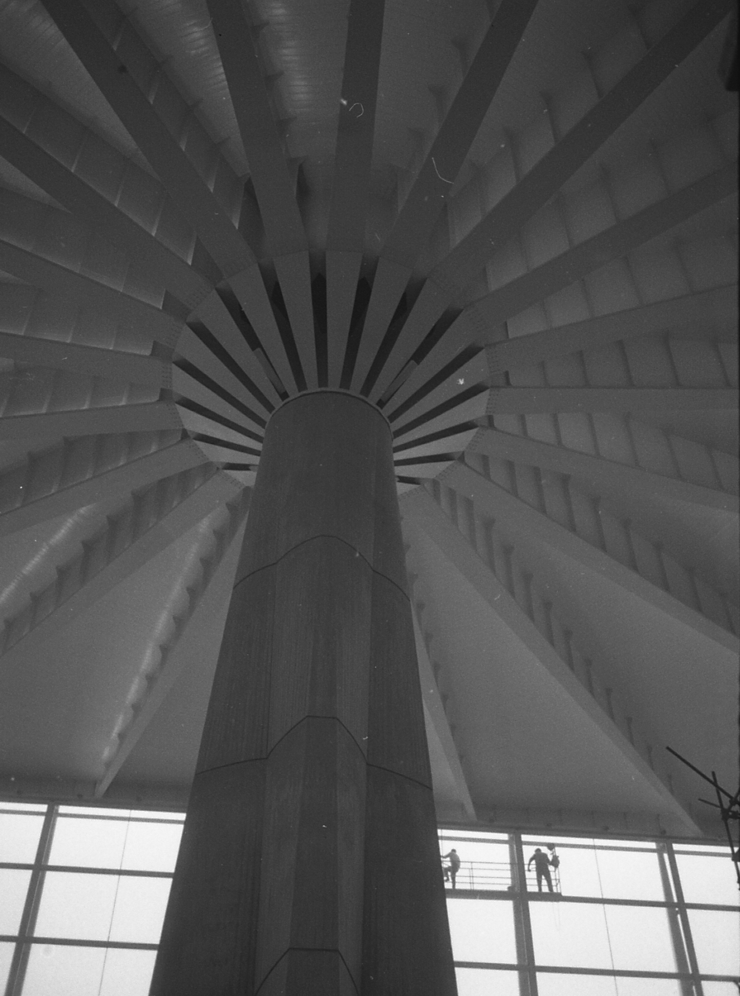 Servizio fotografico : Torino, 1961 / Paolo Monti. - Strisce: 1, Fotogrammi complessivi: 13 : Negativo b/n, gelatina bromuro d'argento/ pellicola ; 24x18mm (35 mm). - ((Sul portanegativi: Penn Agfa 17. - Serie Verde. - Occasione: Esposizione. - Fonte: Agenda di Paolo Monti: Foto Leica 1 / 1-51 verde, 1-110 nera (1958-1963), presso Archivio Paolo Monti